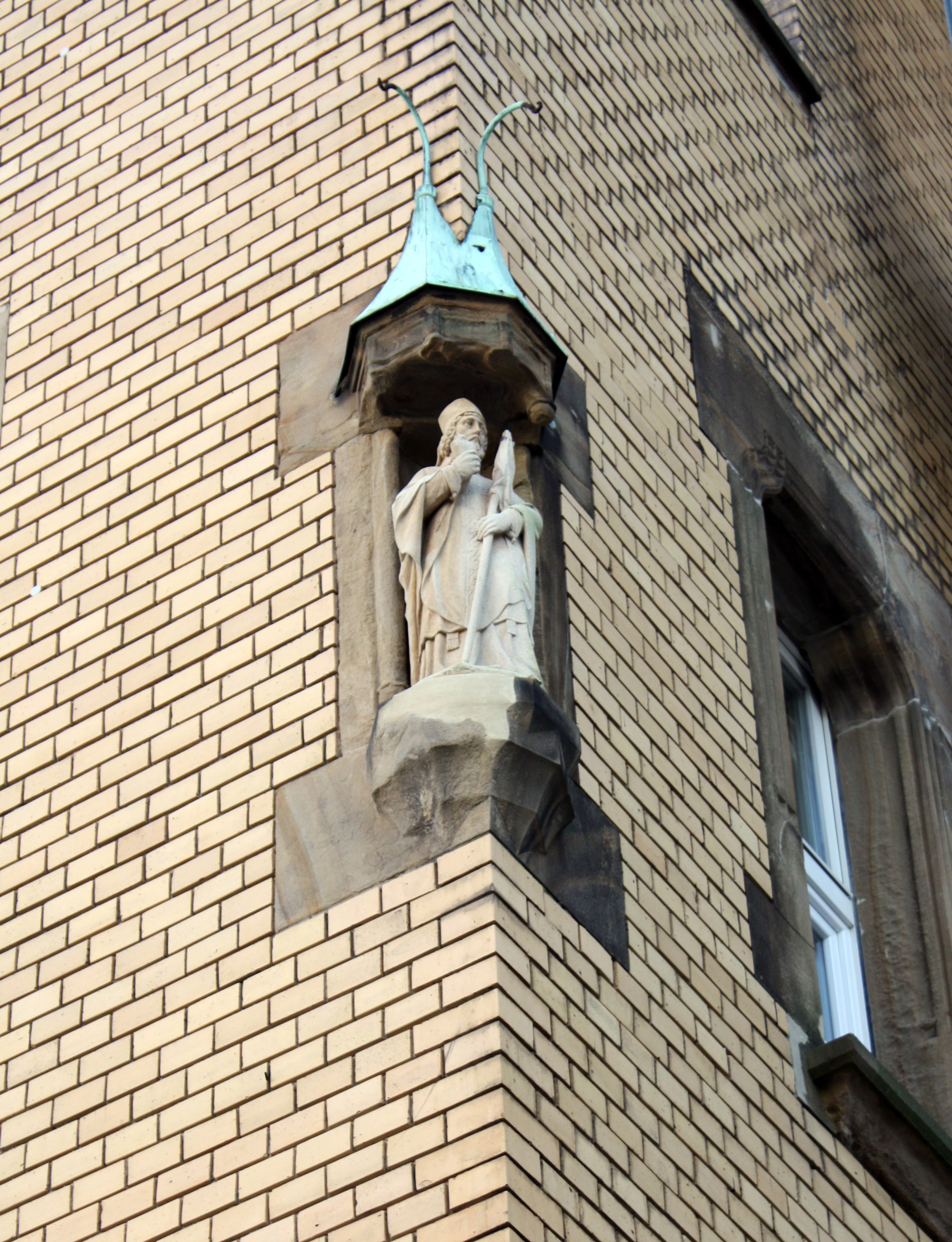 St. Anna-Haus Köln-Lindenthal, Fassadenverzierung